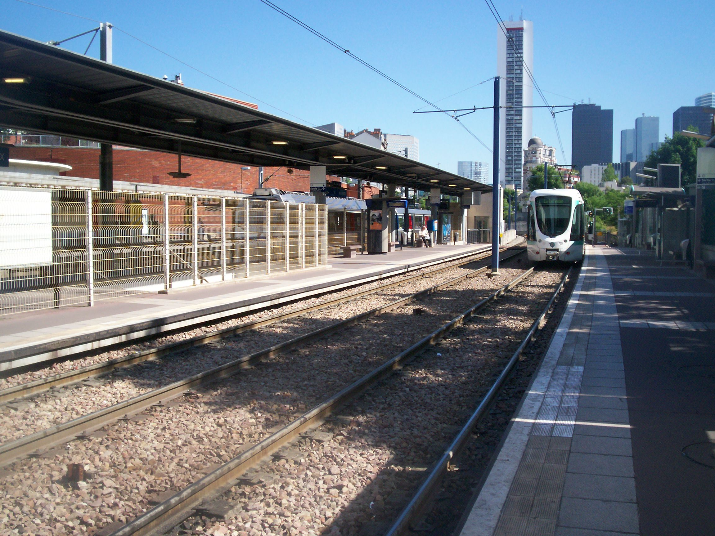 Paris Tramway ligne 2